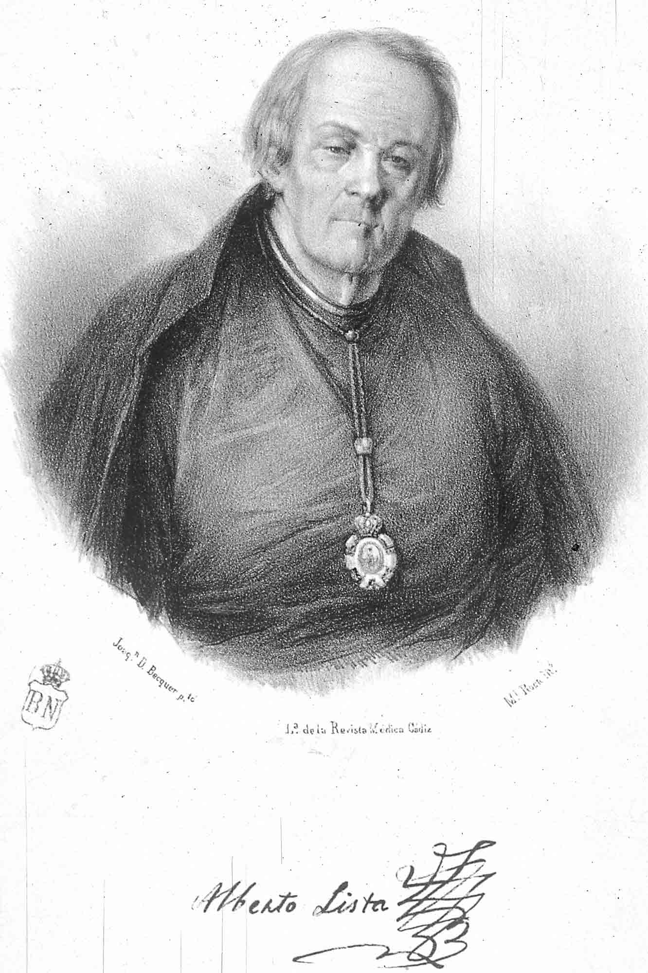 Retrato de Alberto Lista y Aragon